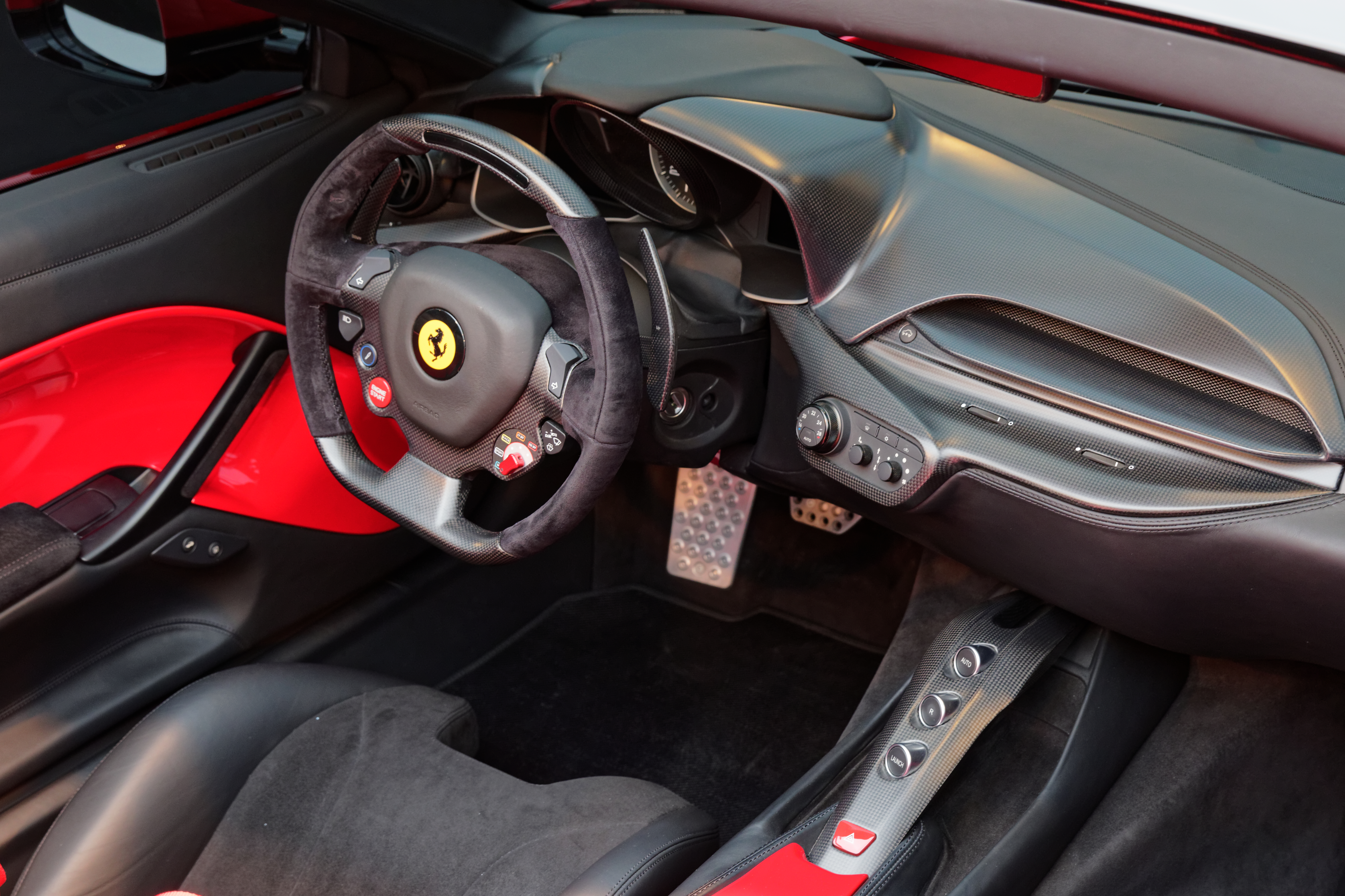 La Ferrari F12 TRS exposée lors du festival automobile international 2015.